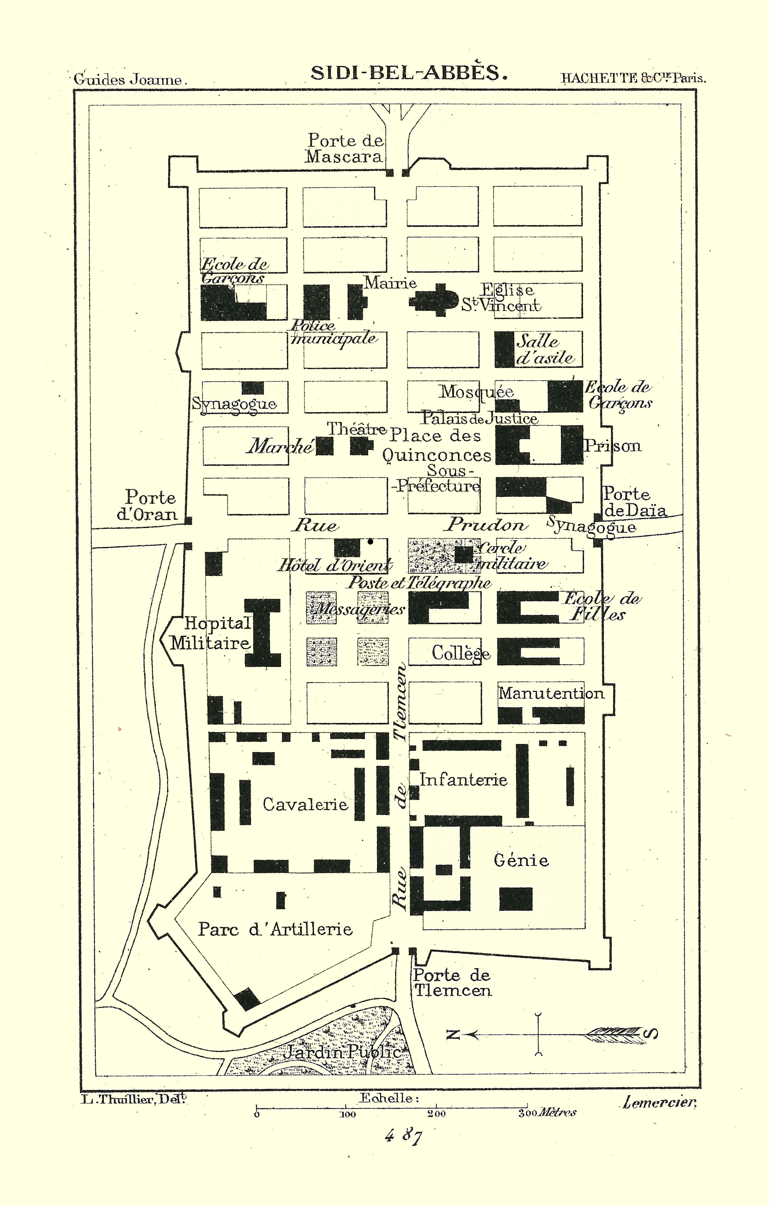 Plan Hachette Joanne, en 1887, de Sidi-bel-Abbès, révisée en avril 1887